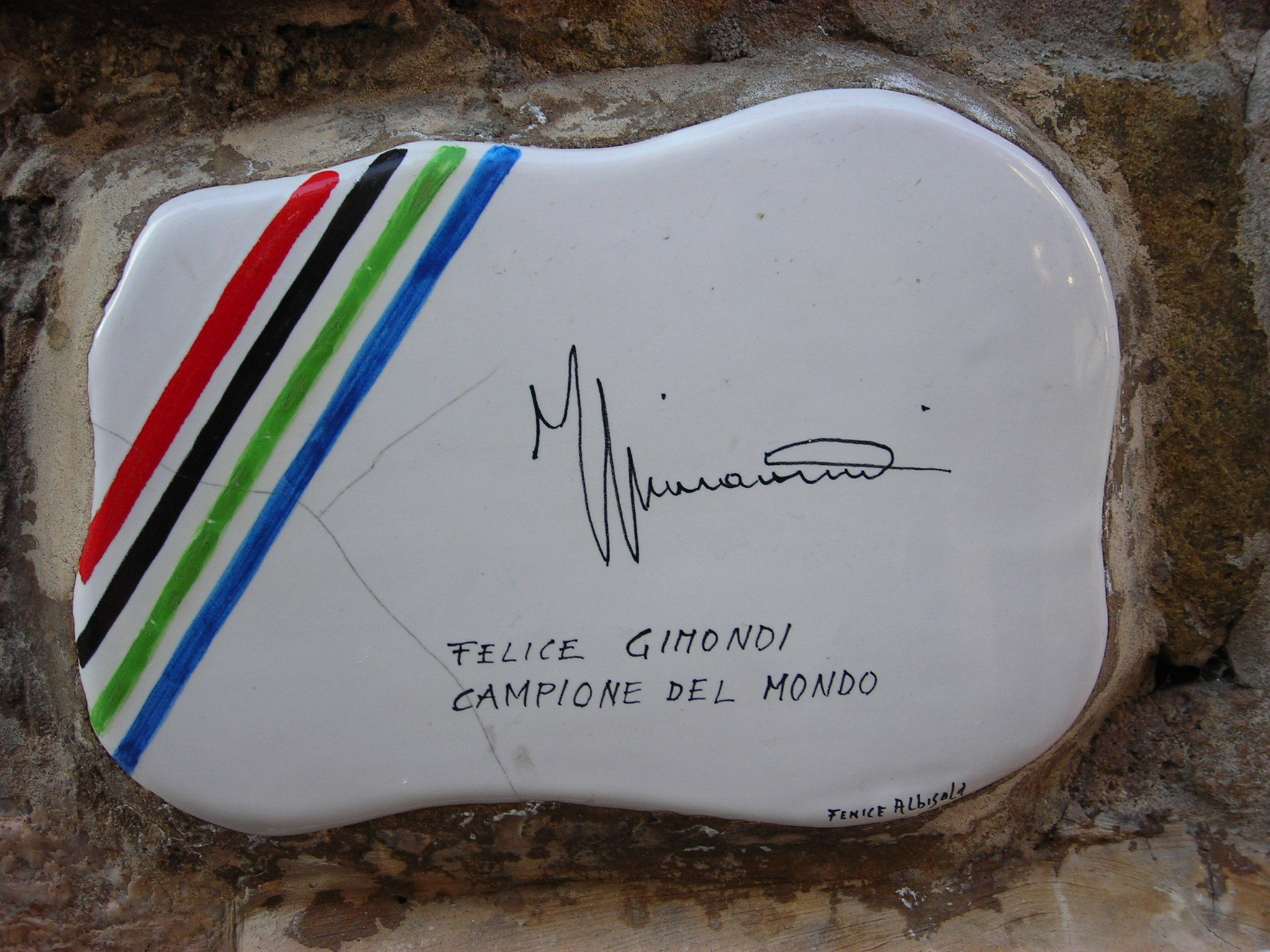 Piastrella del Muretto di Alassio autografata da Felice Gimondi